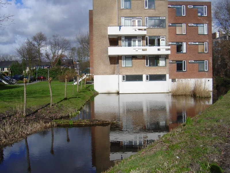 Dit is een overzicht van beide restanten van de burchtmuur van kasteel Paddenpoel te Leiden. Gemaakt door Rob Honig, die vrijwillig afstand doet van alle rechten.